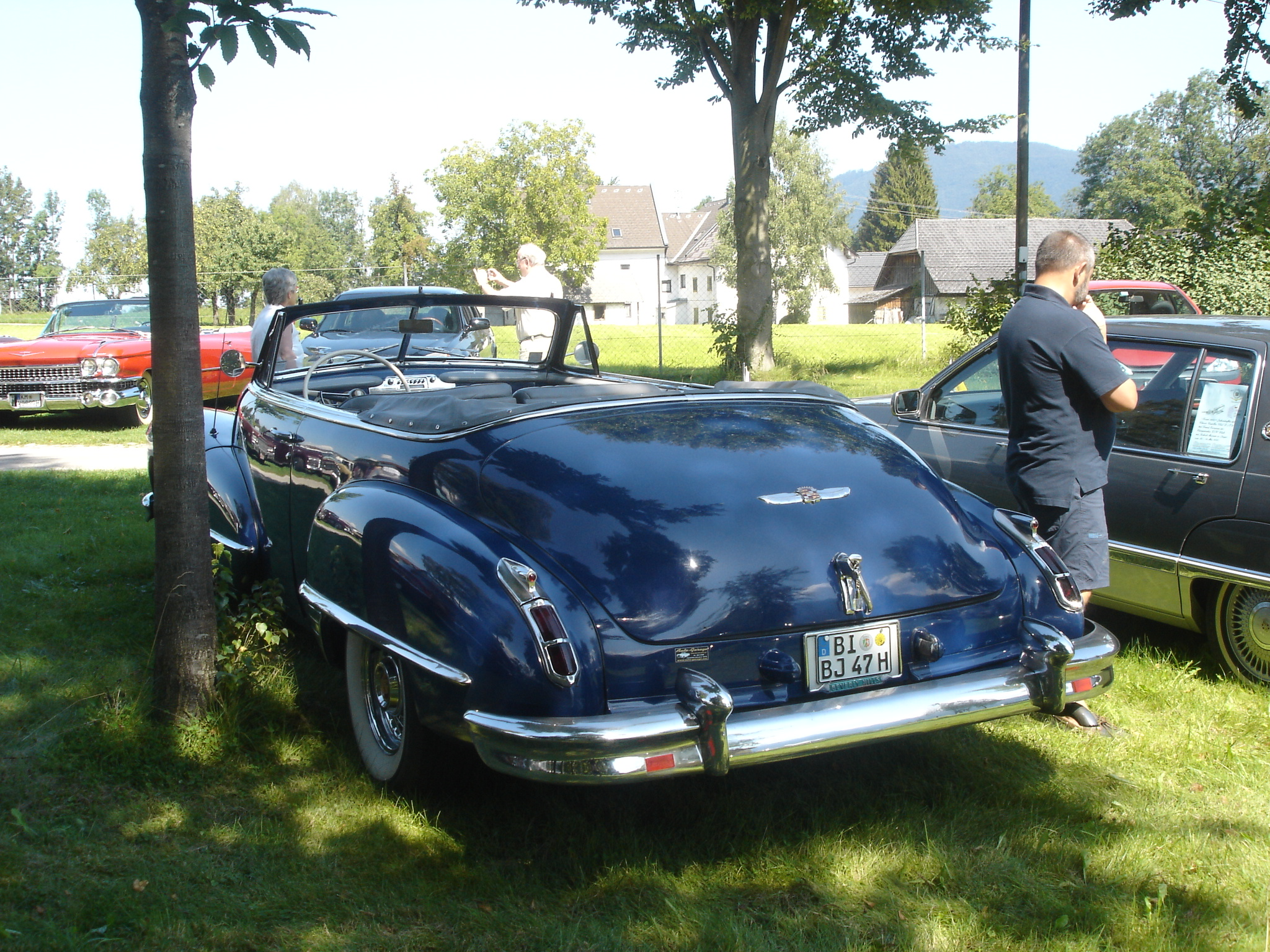 Heck eines Cadillac Series 61